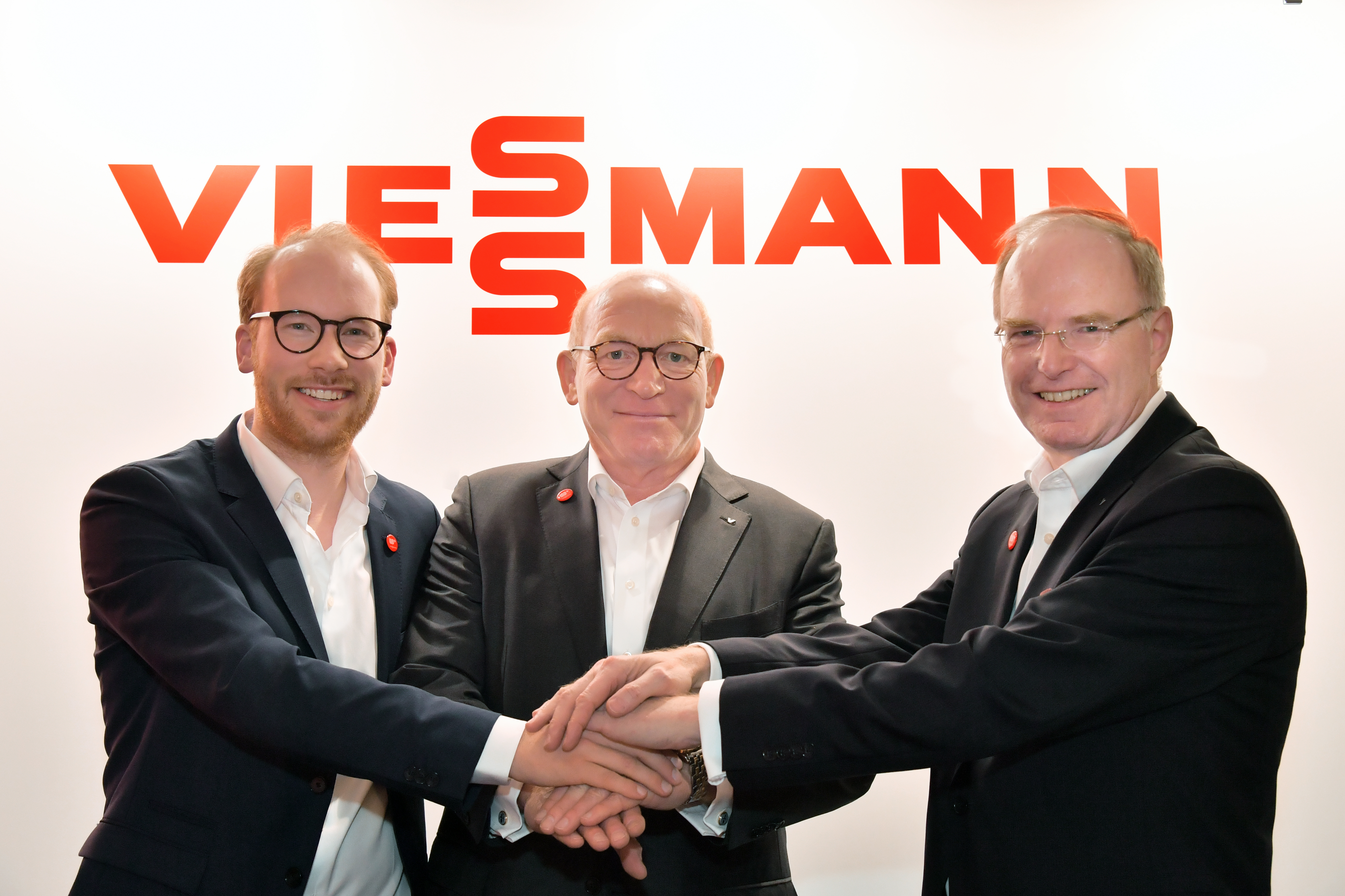 Prof. Dr. Martin Viessmann, Präsident der Viessmann Group (Bildmitte) mit den Group-CEOs Maximilian Viessmann (links) und Joachim Janssen.